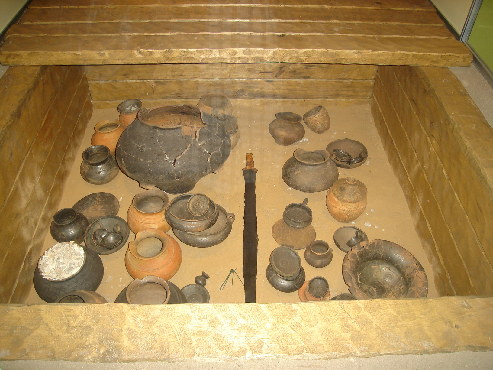 Grób komorowy z okresu halsztackiego w Polsce.